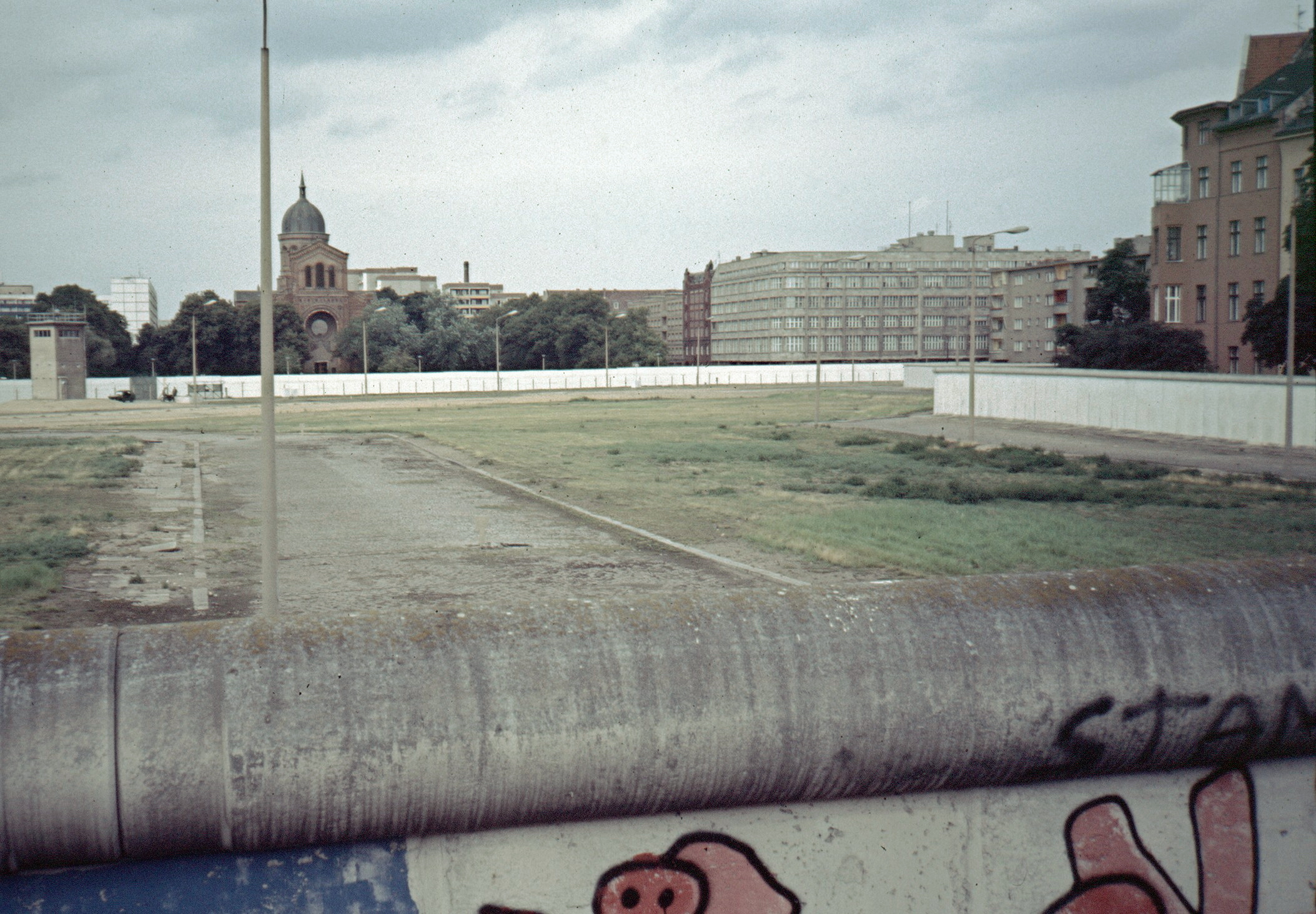 Verfülltes Engelbecken in Berlin